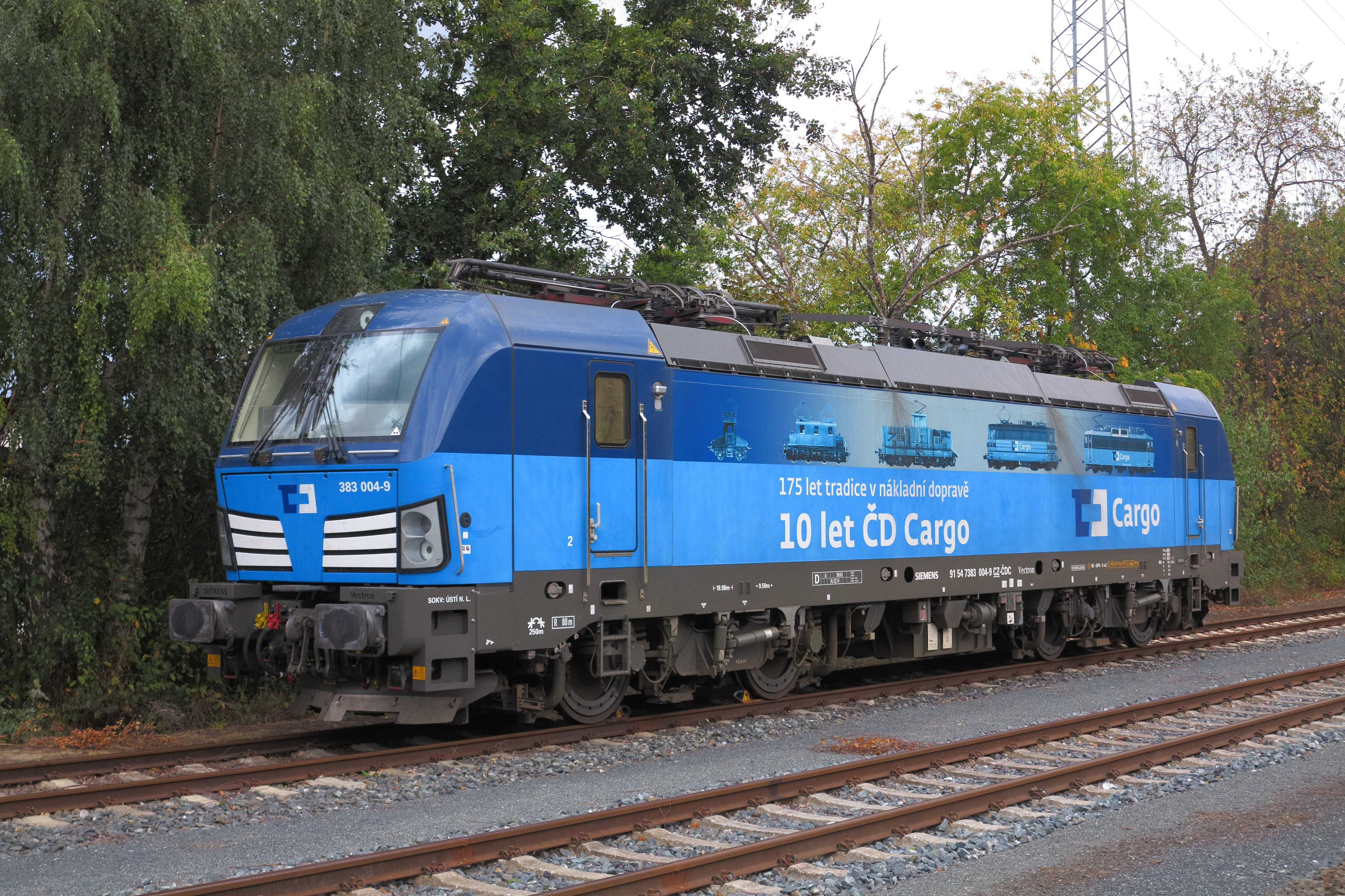 Die Elektrolok 383004-9 (Siemens Vectron MS) auf der nicht elektrifizierten Braunschweiger Hafenbahn